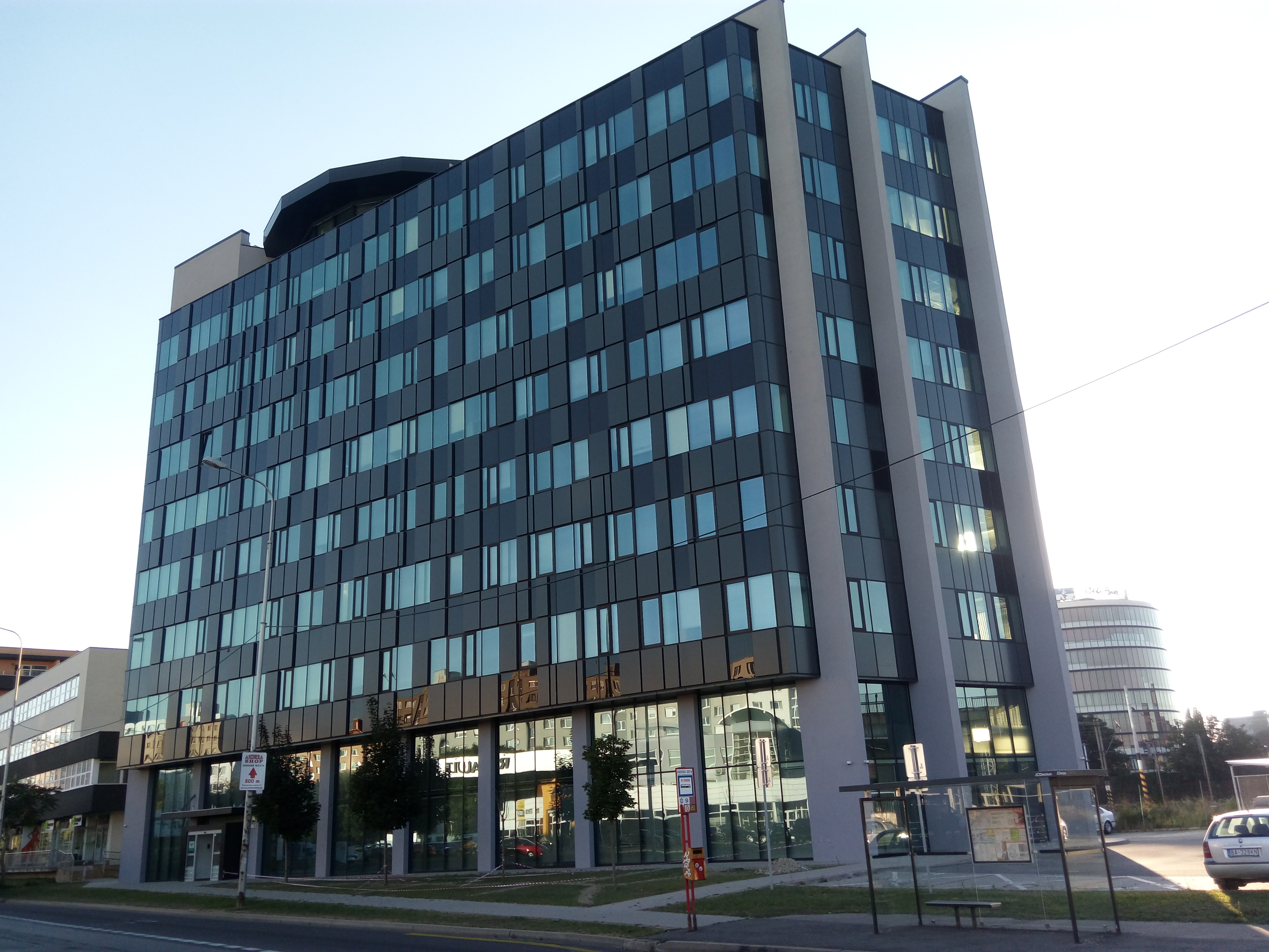 Panónska cesta 2, Petržalka, Bratislava